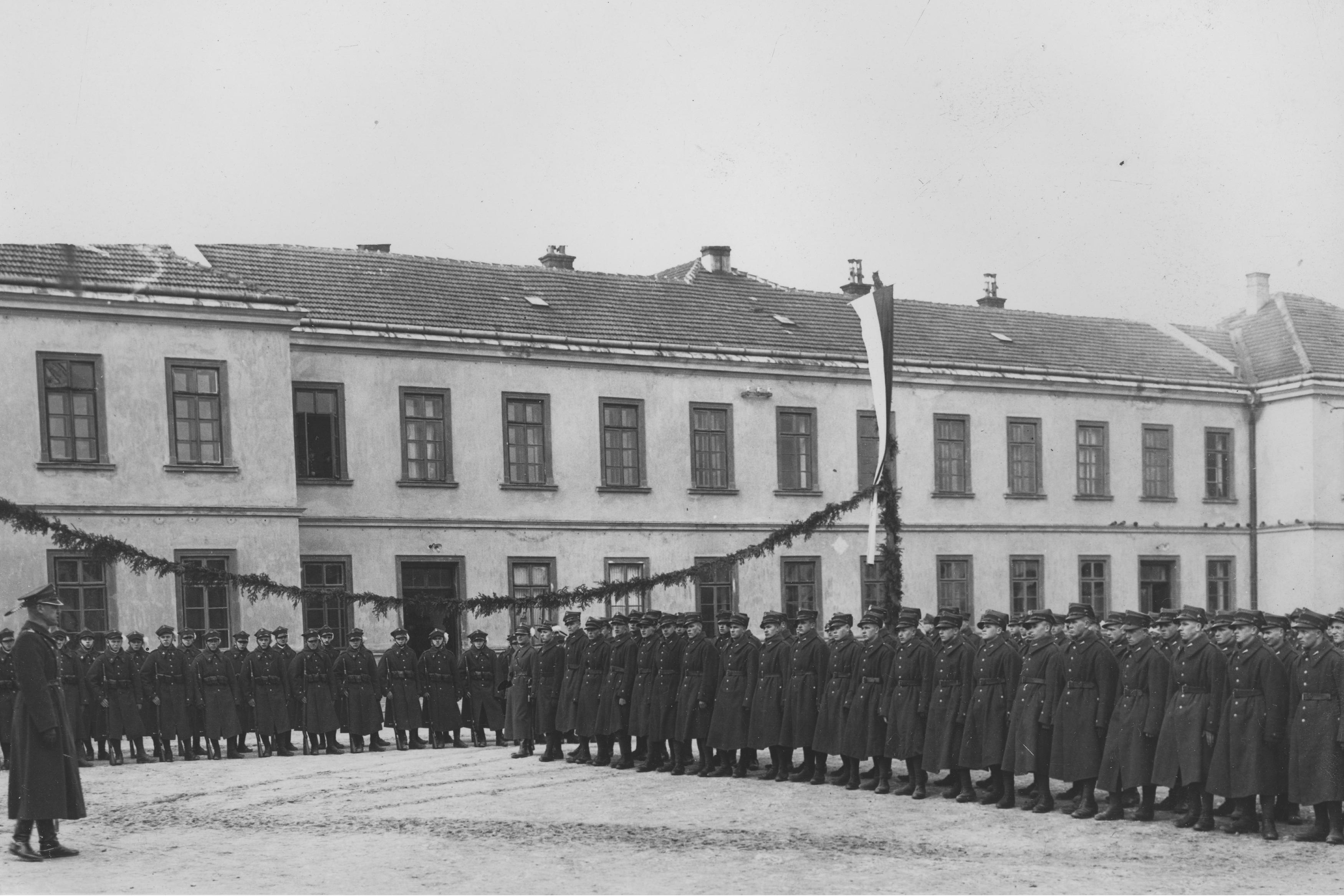 Zaciąg ochotniczy do 3 Pułku Strzelców Podhalańskich w Woli Justowskiej - rekruci w szeregu na dziedzińcu koszar; styczeń 1937 r. Koncern Ilustrowany Kurier Codzienny - Archiwum Ilustracji. Sygnatura: 1-W-1316-1